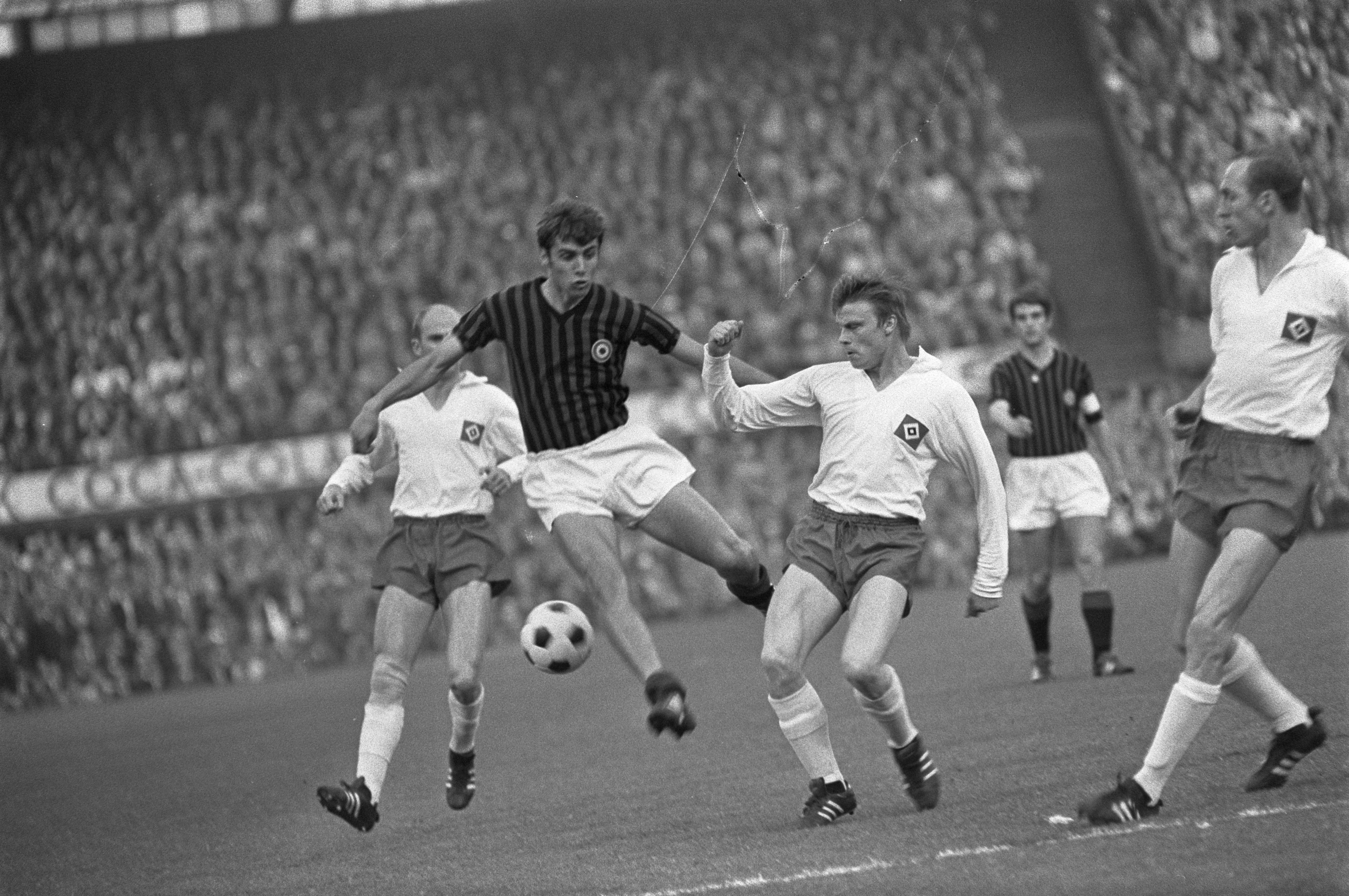 Collectie / Archief : Fotocollectie Anefo Reportage / Serie : [ onbekend ] Beschrijving : Finale Europa Cup II AC Milan tegen HSV Hamburg 2-0. Spelmomenten Datum : 23 mei 1968 Locatie : Rotterdam Trefwoorden : sport, voetbal Instellingsnaam : AC Milaan Fotograaf : Kroon, Ron / Anefo Auteursrechthebbende : Nationaal Archief Materiaalsoort : Negatief (zwart/wit) Nummer archiefinventaris : bekijk toegang 2.24.01.05 Bestanddeelnummer : 921-3782